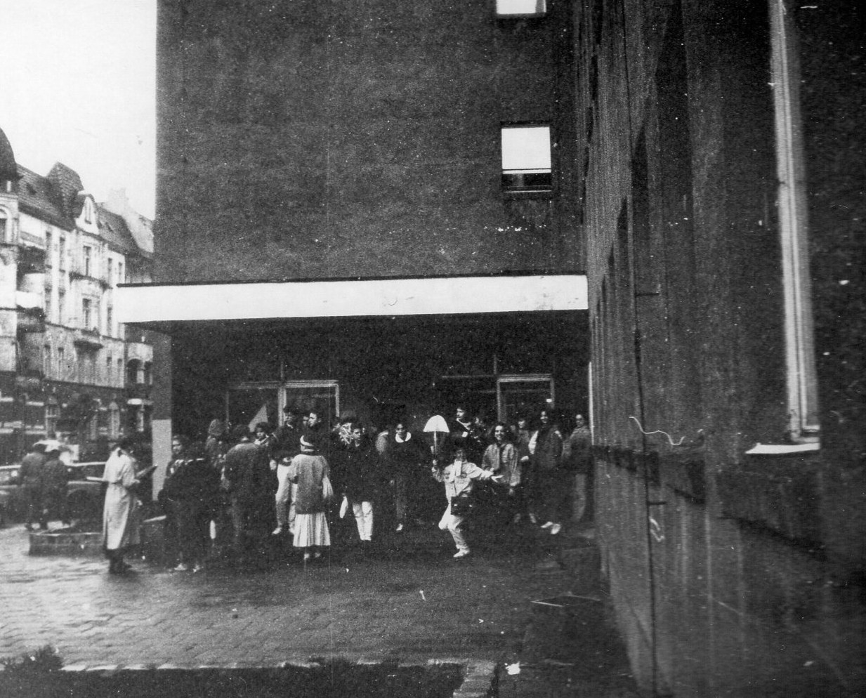 II LO Poznań - 21.11.1989r.